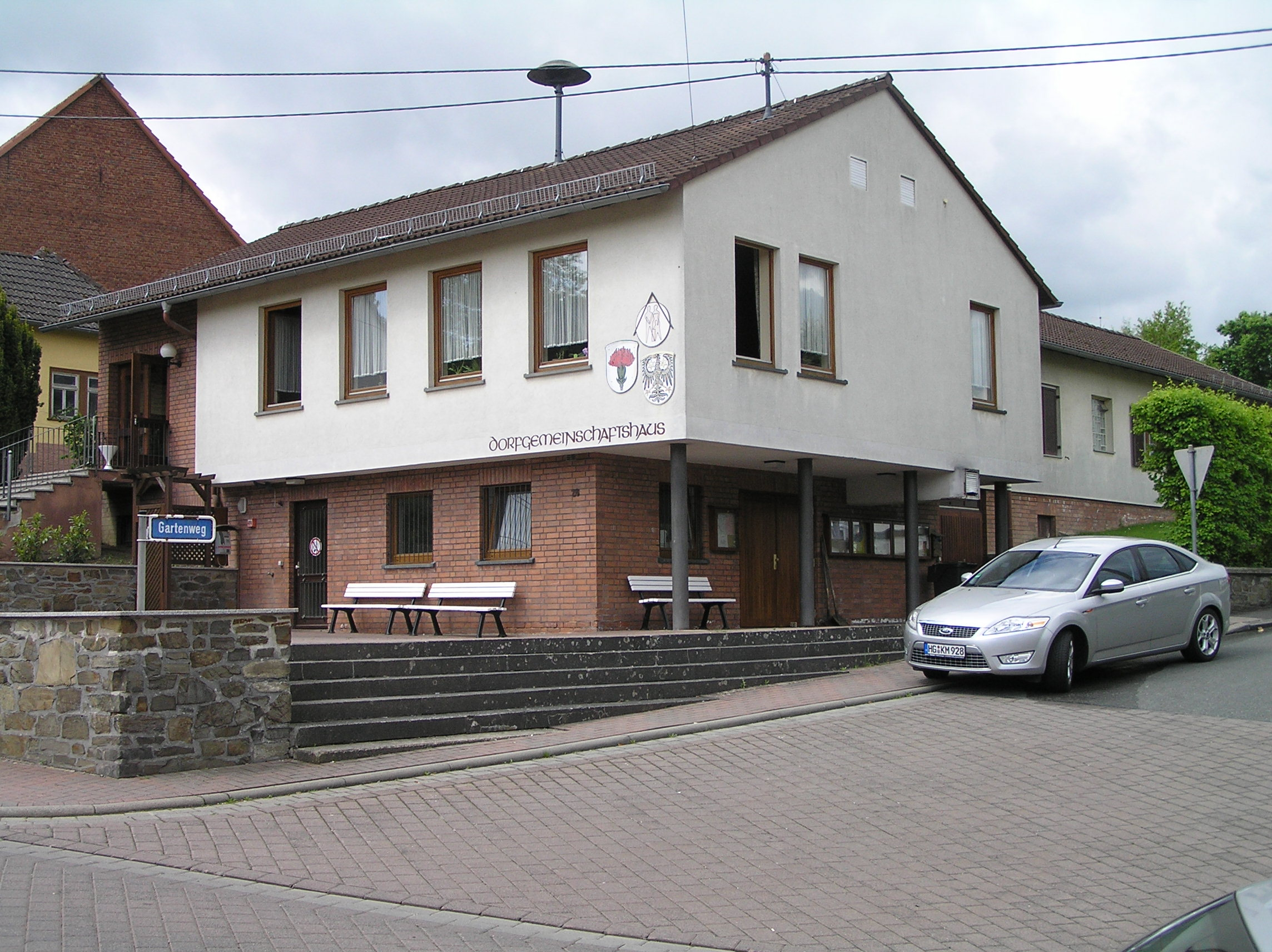 Dorfgemeinschaftshaus, Naunstadt, Grävenwiesbach